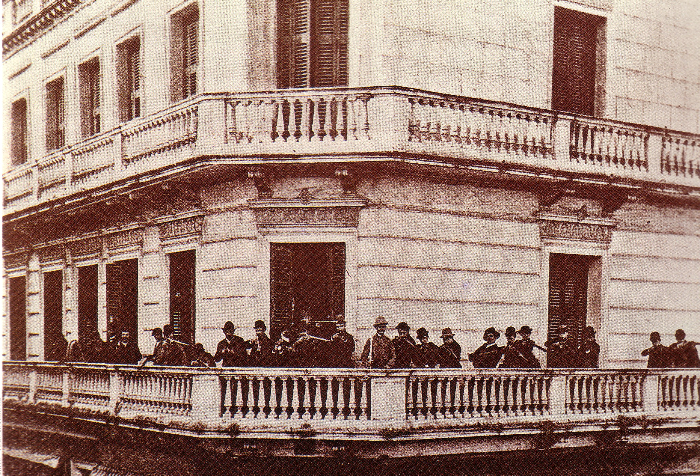 Revolución de 1890. Cantón revolucionario de Talcahuano y Piedad (Mitre). Buenos Aires.